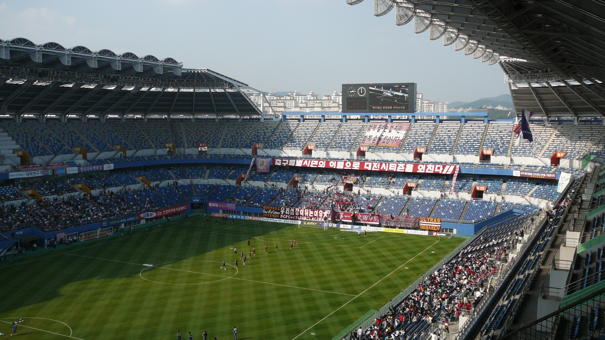 Daejeon World Cup Stadium